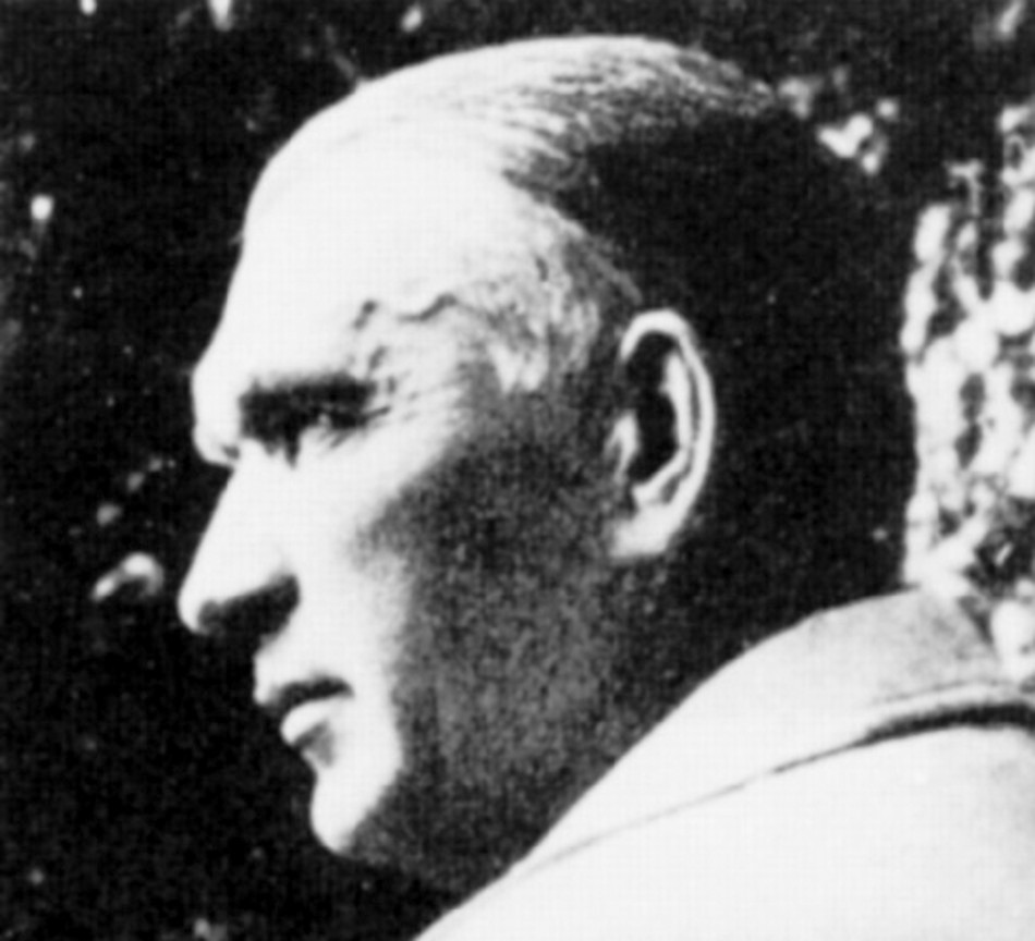 Klement Šilinger (1887-1951), slovenský architekt